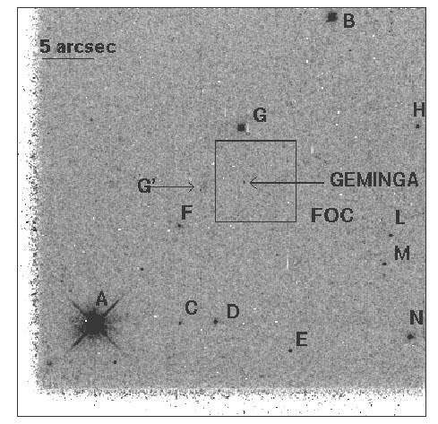 Alla ricerca della controparte ottica - 2